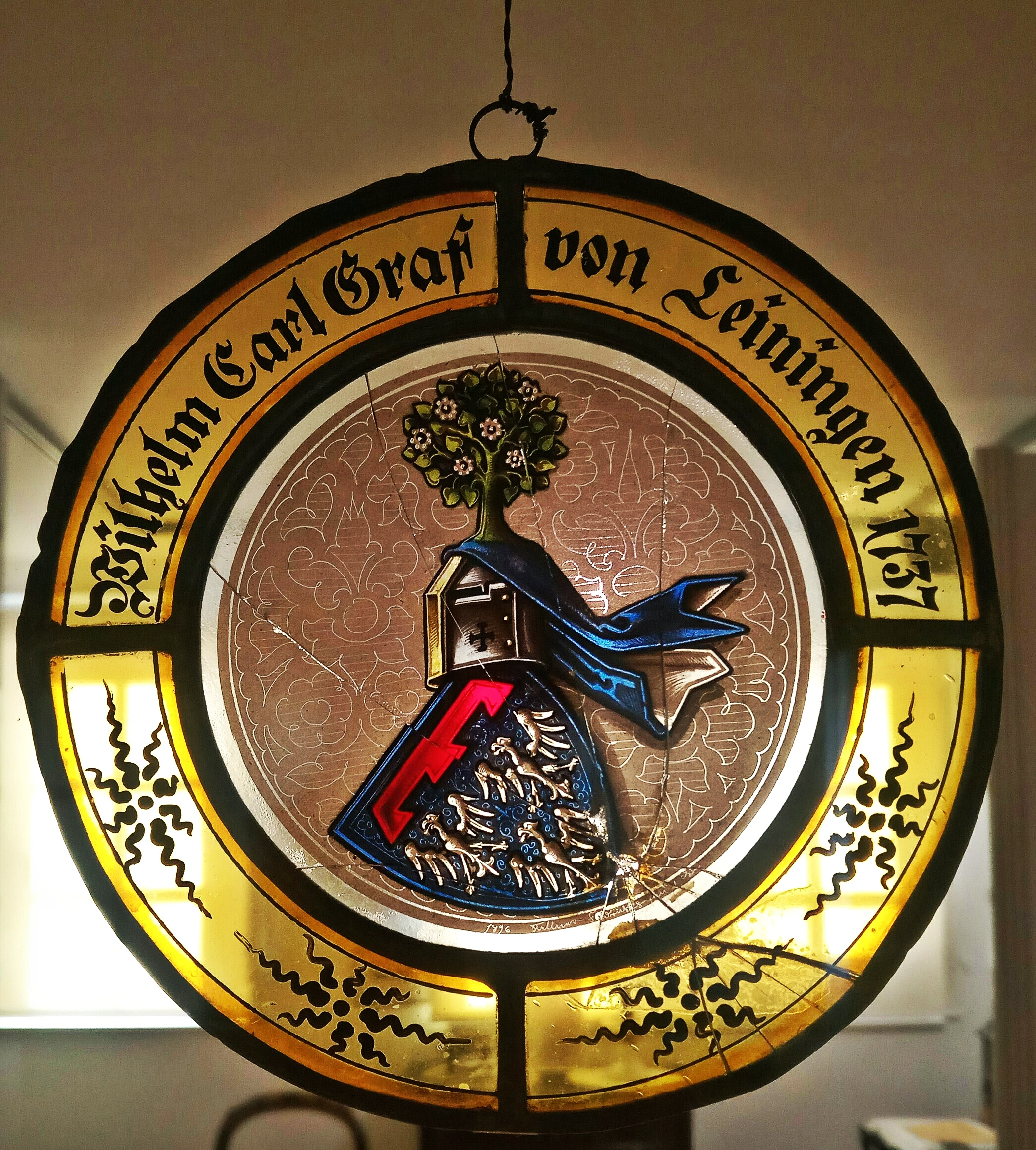 Glas-Wappenscheibe Graf Wilhelm Carl von Leiningen-Guntersblum (1737-1809), gefertigt, Glasmaler Kellner, Friedrichshafen, 1896, Museum Grünstadt.